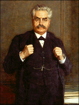 Alexandre Millerand, portrait présidentiel peint par Marcel-André Baschet.